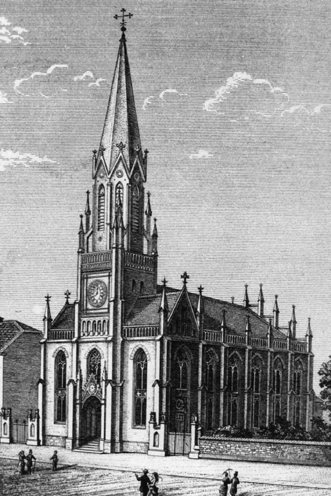 Friedenskirche, Wuppertal-Heckinghausen, Germany